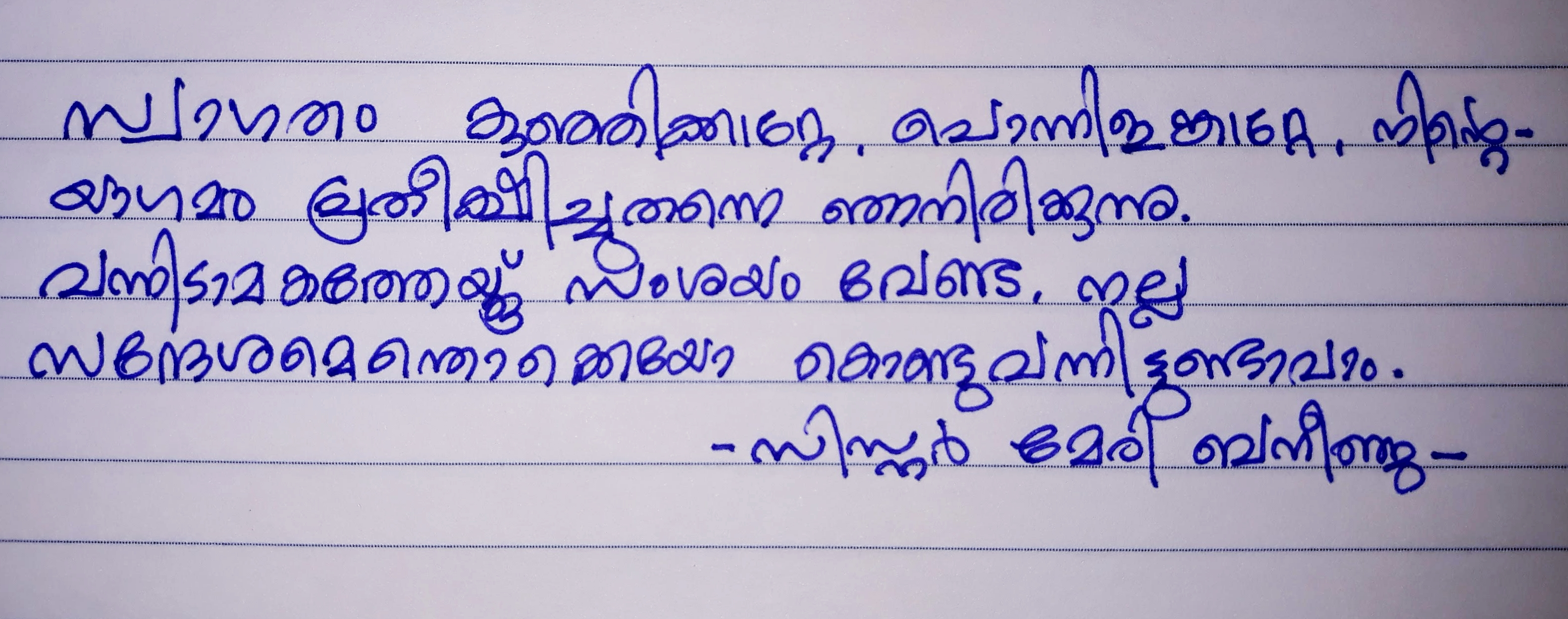 sister mary benigna poems in malayalam